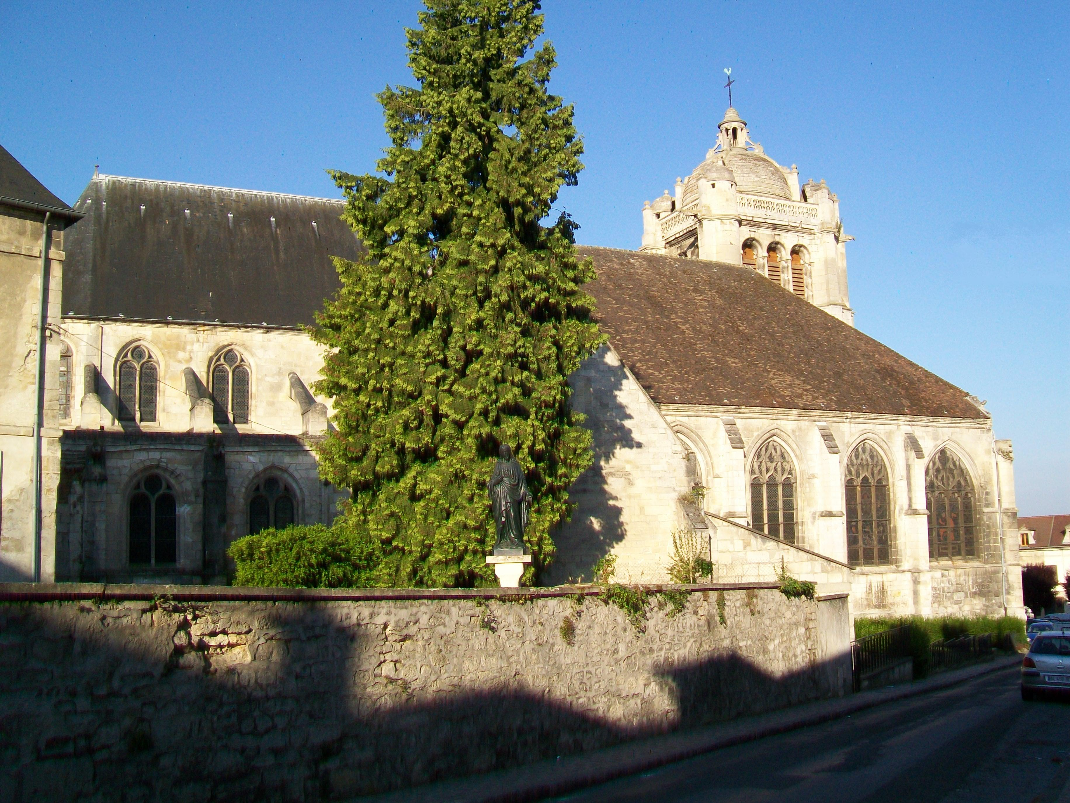 L'église Sainte-Maxence depuis la rue du Moustier ; façade nord.